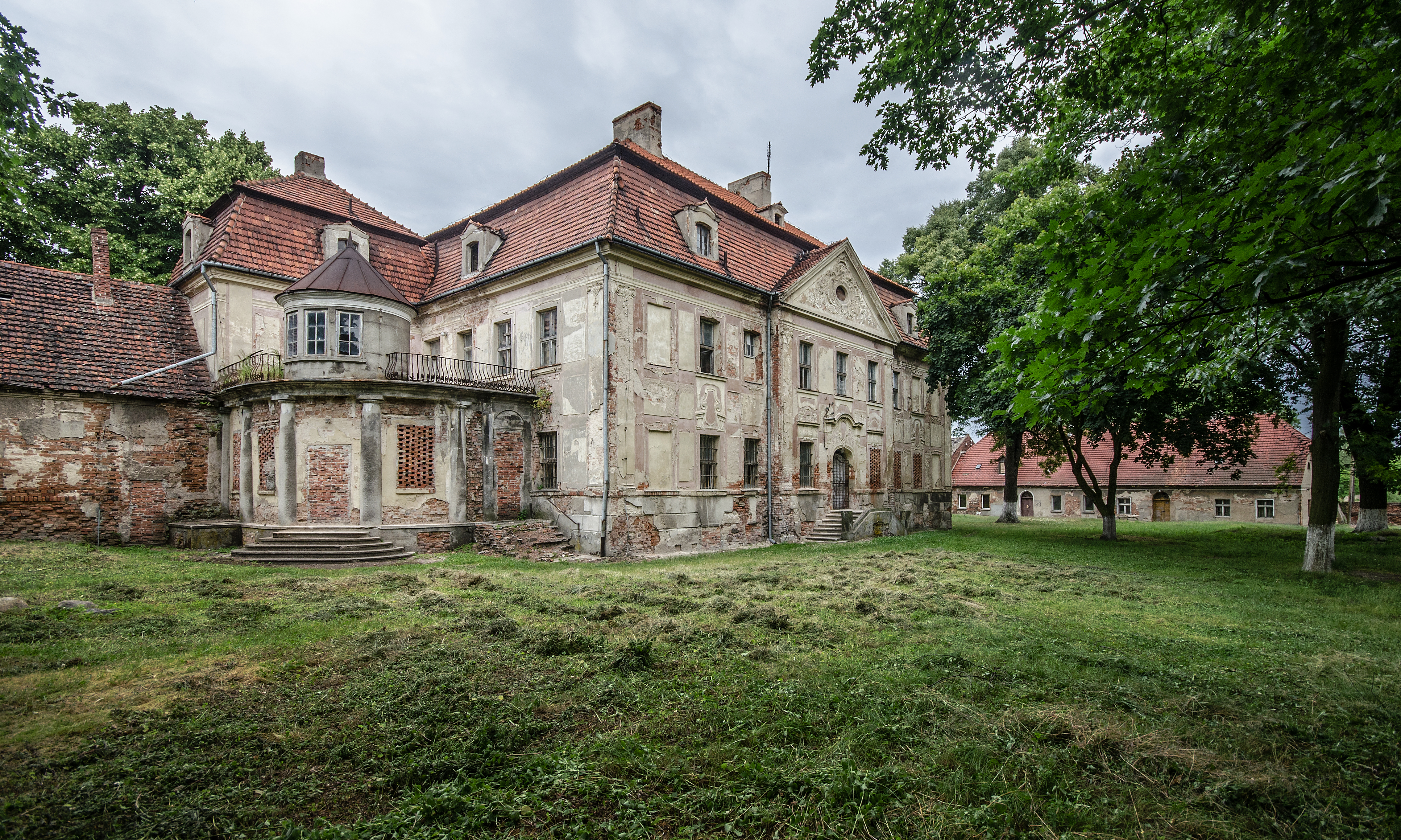 Żukowice, pałac, 1743. Widok od strony parku.